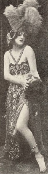 Norka Rouskaya